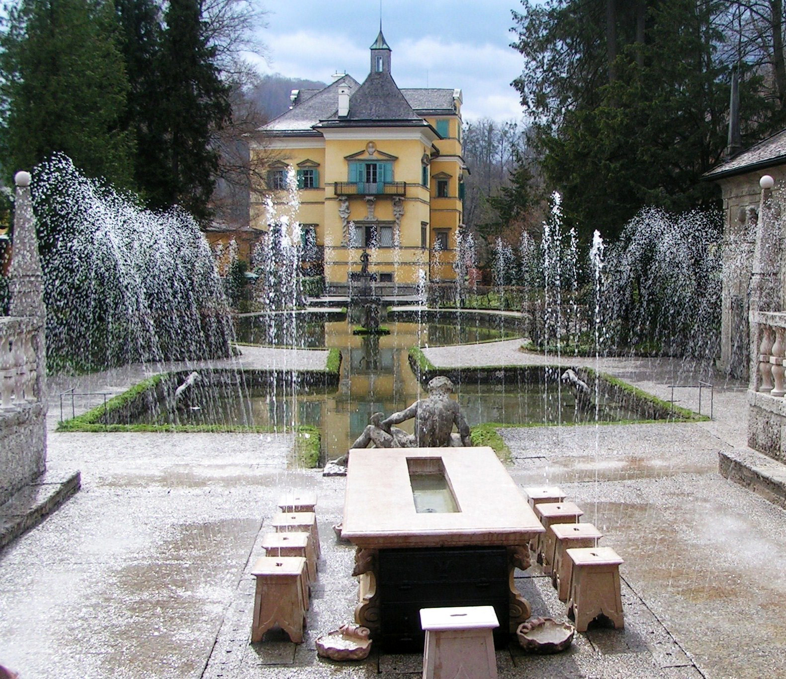 Salisburgo - Castello di Hellbrunn - Giochi d'acqua